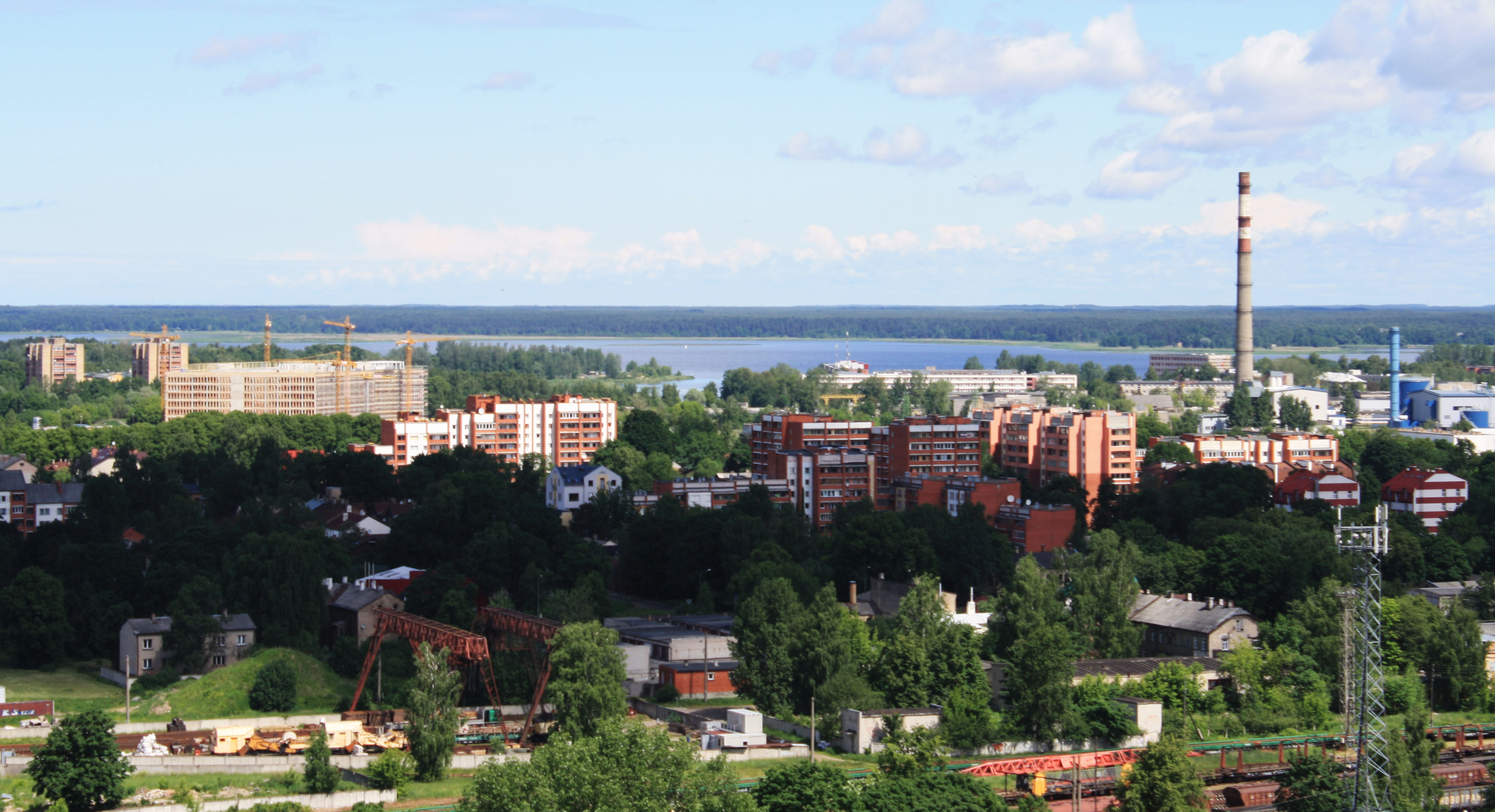 Рига (Латвия) Офисный центр "Европа" - вид на Кишозеро и район Чиекуркалнс